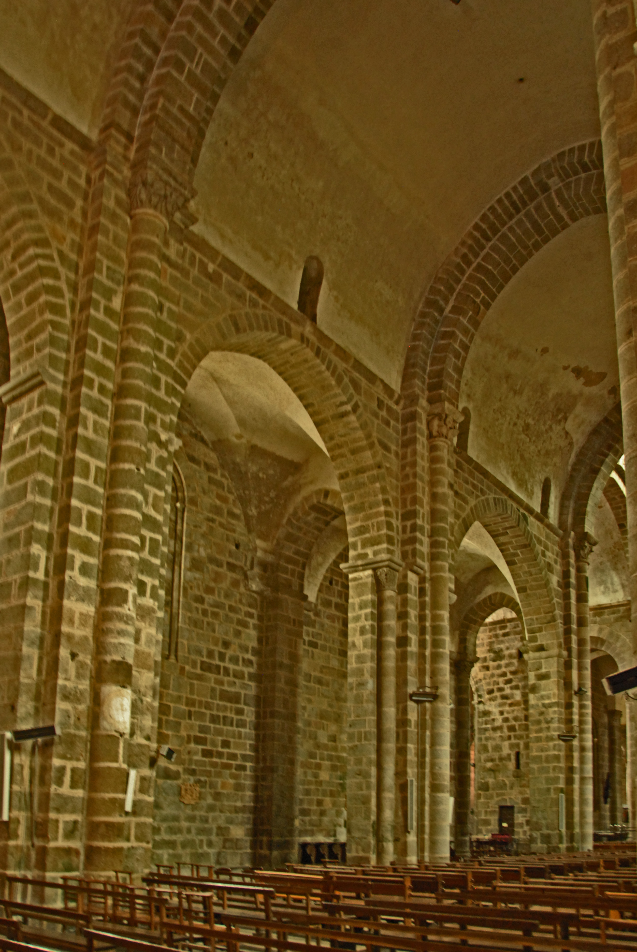 St-Pierre de Le Dorat, Mittelschiff, Nordseiter, Joch 4 + 5